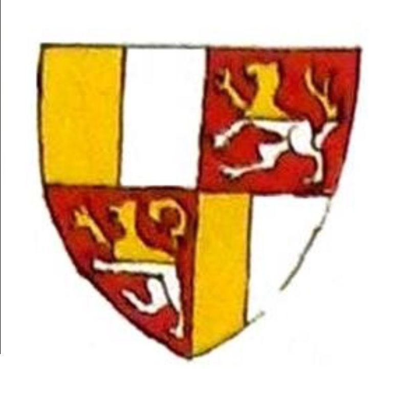 Erb pánů z Rabštejna (tzv. mladších Rabštejnů)